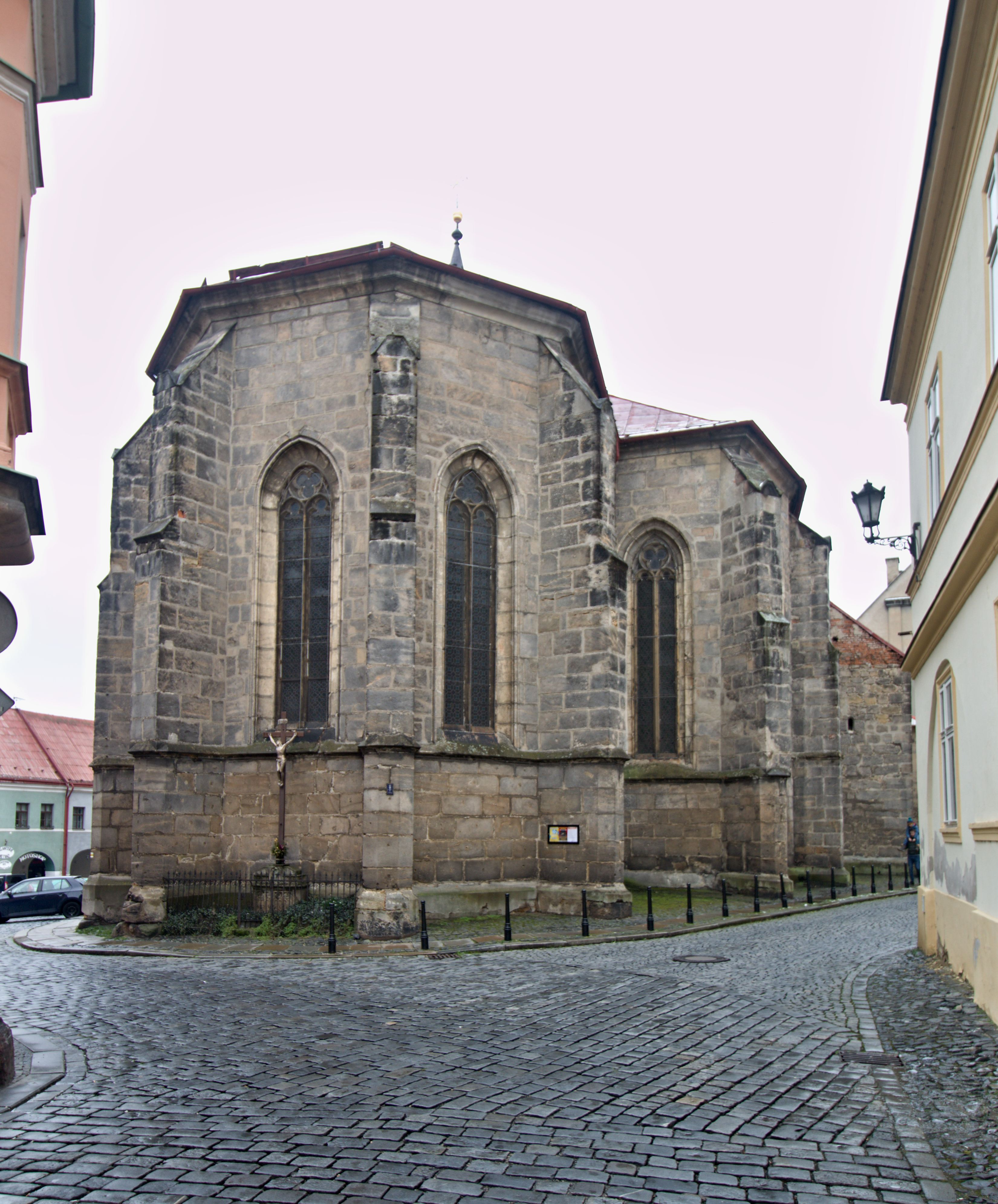 Jezuitský kostel sv. Ignáce z Loyoly v Jičíně